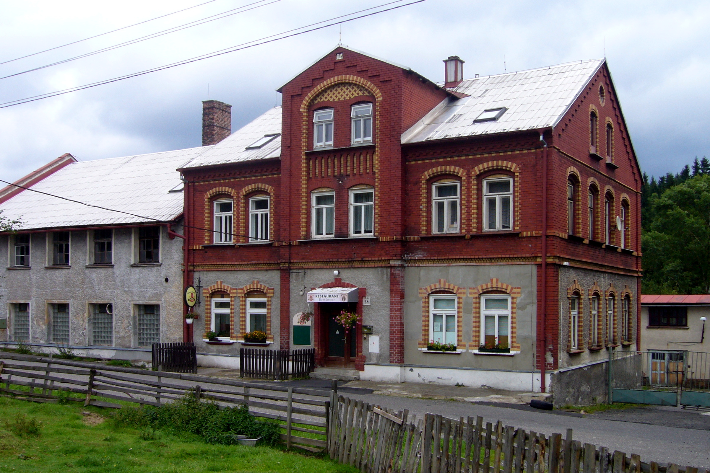 Černý Potok - hostinec Port Artur v bývalé Fladerově továrně